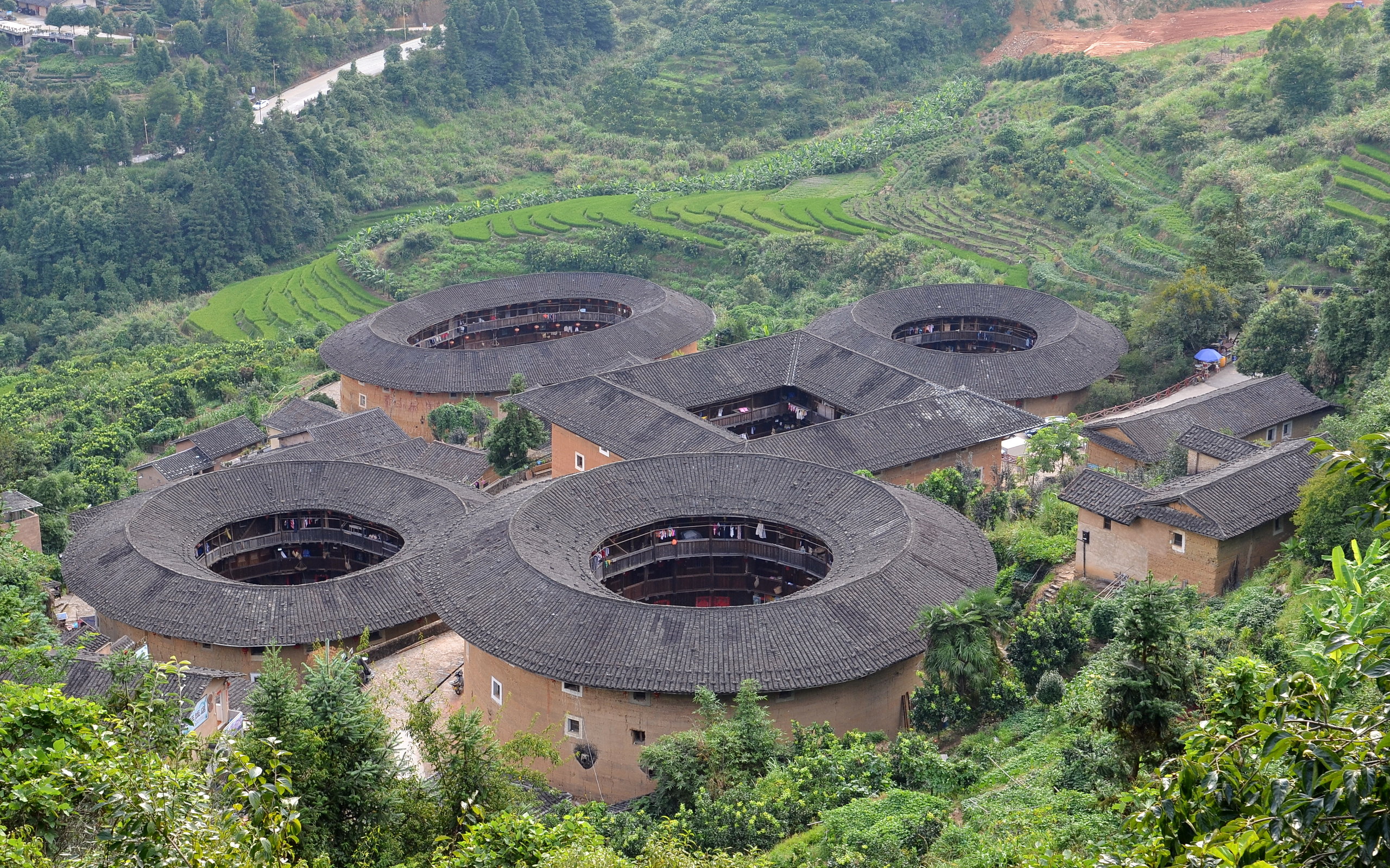 福建漳州南靖县田螺坑土楼群，由一座方楼、三座圆楼、一座椭圆楼组成，俗称：“四菜一汤”。